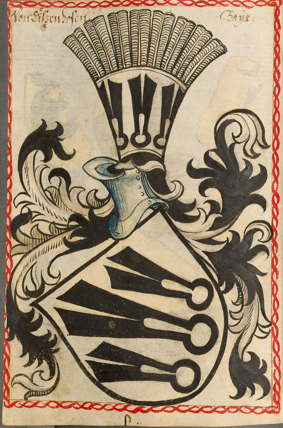 Scheibler'sches Wappenbuch , älterer Teil; Seite 320 Von Eißenhofen Bayr